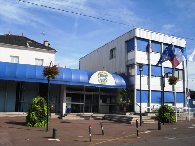 Hôtel de ville de Vigneux-sur-Seine (91)